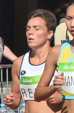 Passage du marathon des jeux olympiques de Rio 2016 dans le centre de Rio